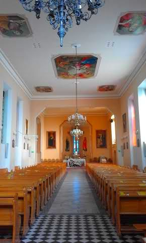 Widok na nowe prezbiterium kościoła w Milejowie.